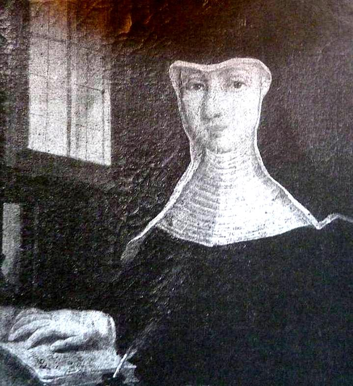 Salome von Pfaumern, 1 Priorin der Benediktinerabtei Fulda